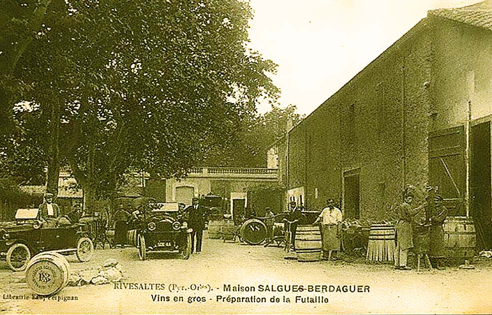 Préparation de la futaille chez un négociant de vins en gros à Rivesaltes